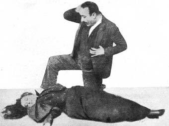 Los actores Emilio Thuillier y Juana Martínez interpretando la obra de teatro Juan Jos'e, de Joaquín Dicenta